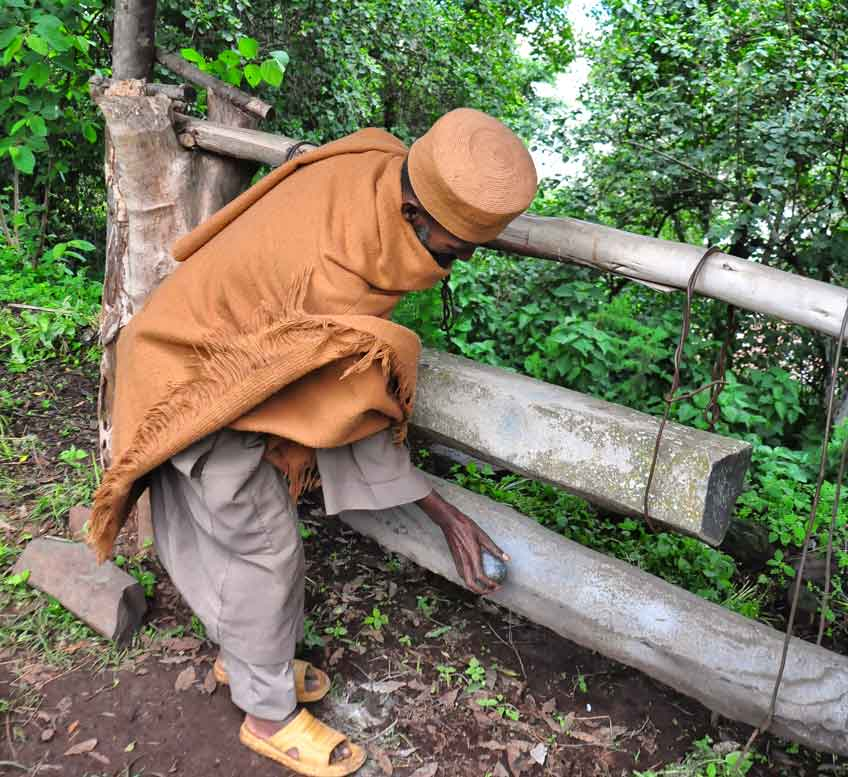 Lake Tana, Bahir Dar